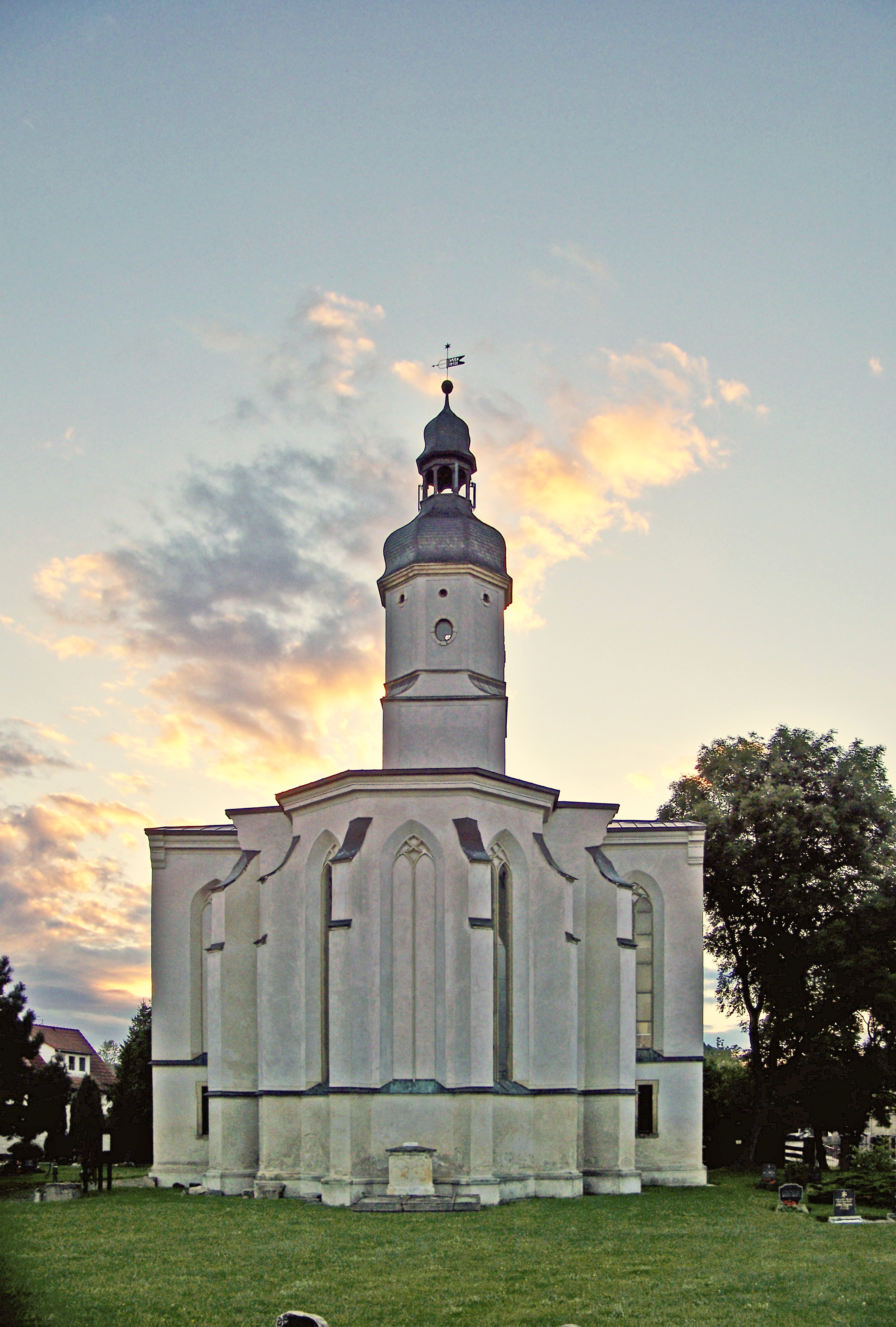 Ruine Patronatskirche in Klein-Wölkau (Gemeinde Schönwölkau), Sachsen; gesehen in der Straße Zum Kreuzberg Baujahre: 1680 bis 1688